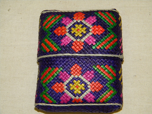 Aus Palmblättern gewobener Behälter aus Osttimor